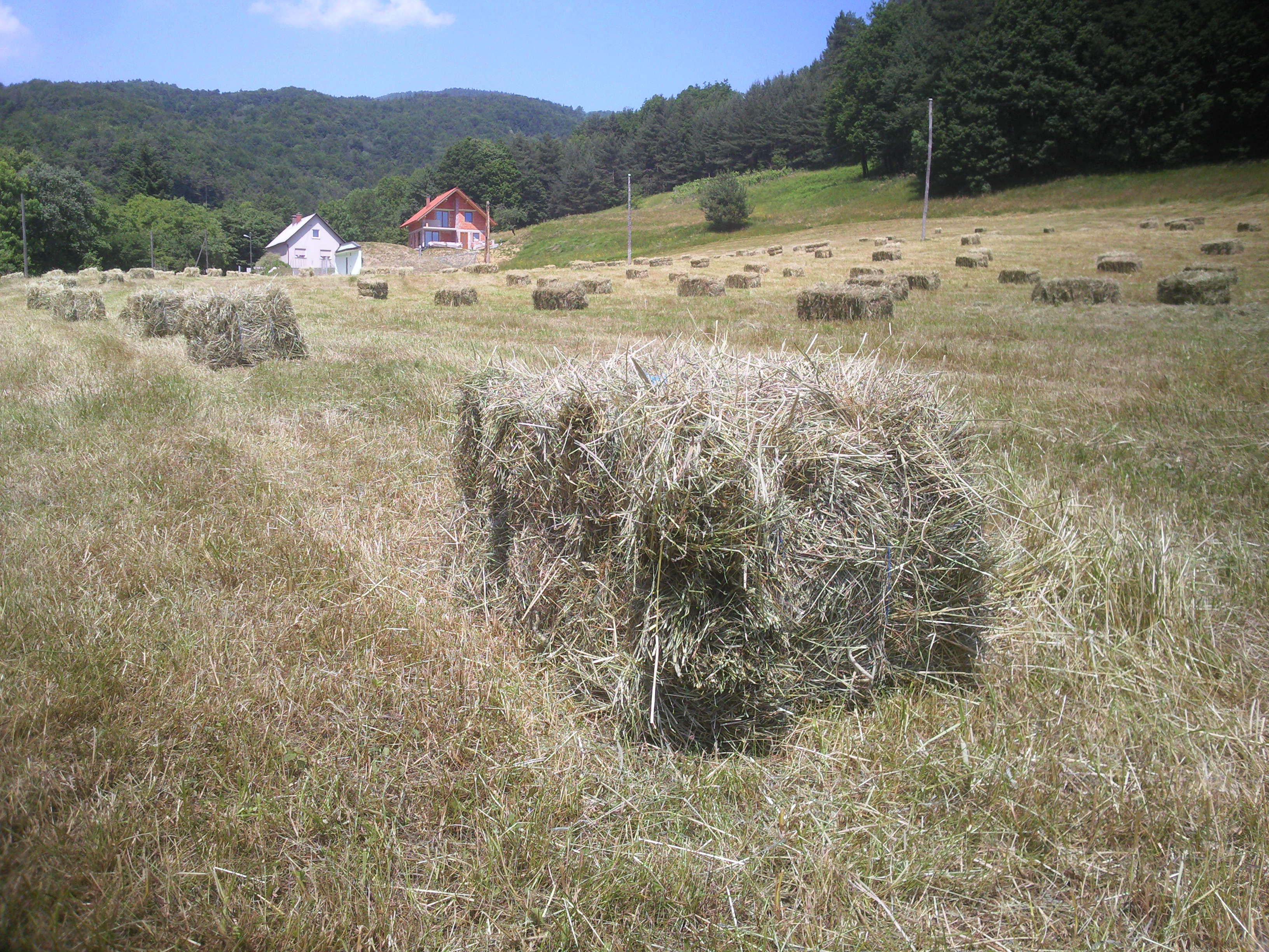 Samsung